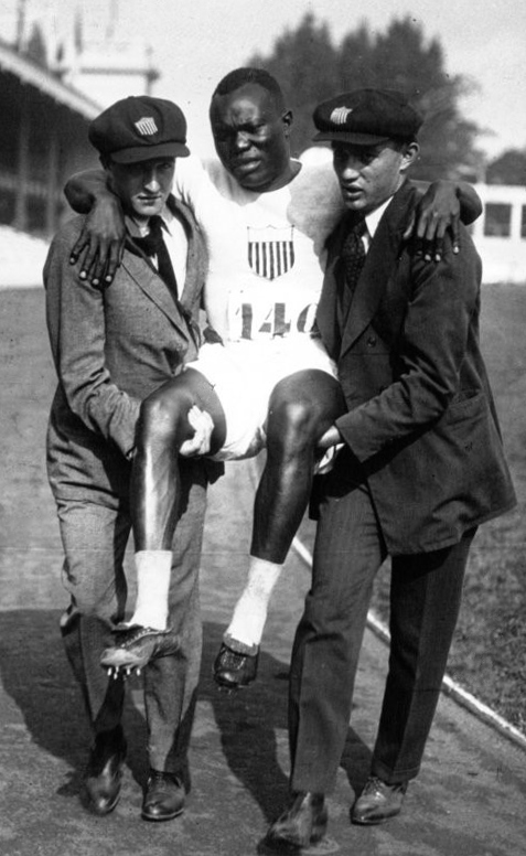 VIIes Olympiades à Anvers : Butler emmené par son manager : [photographie de presse] / Agence Meurisse